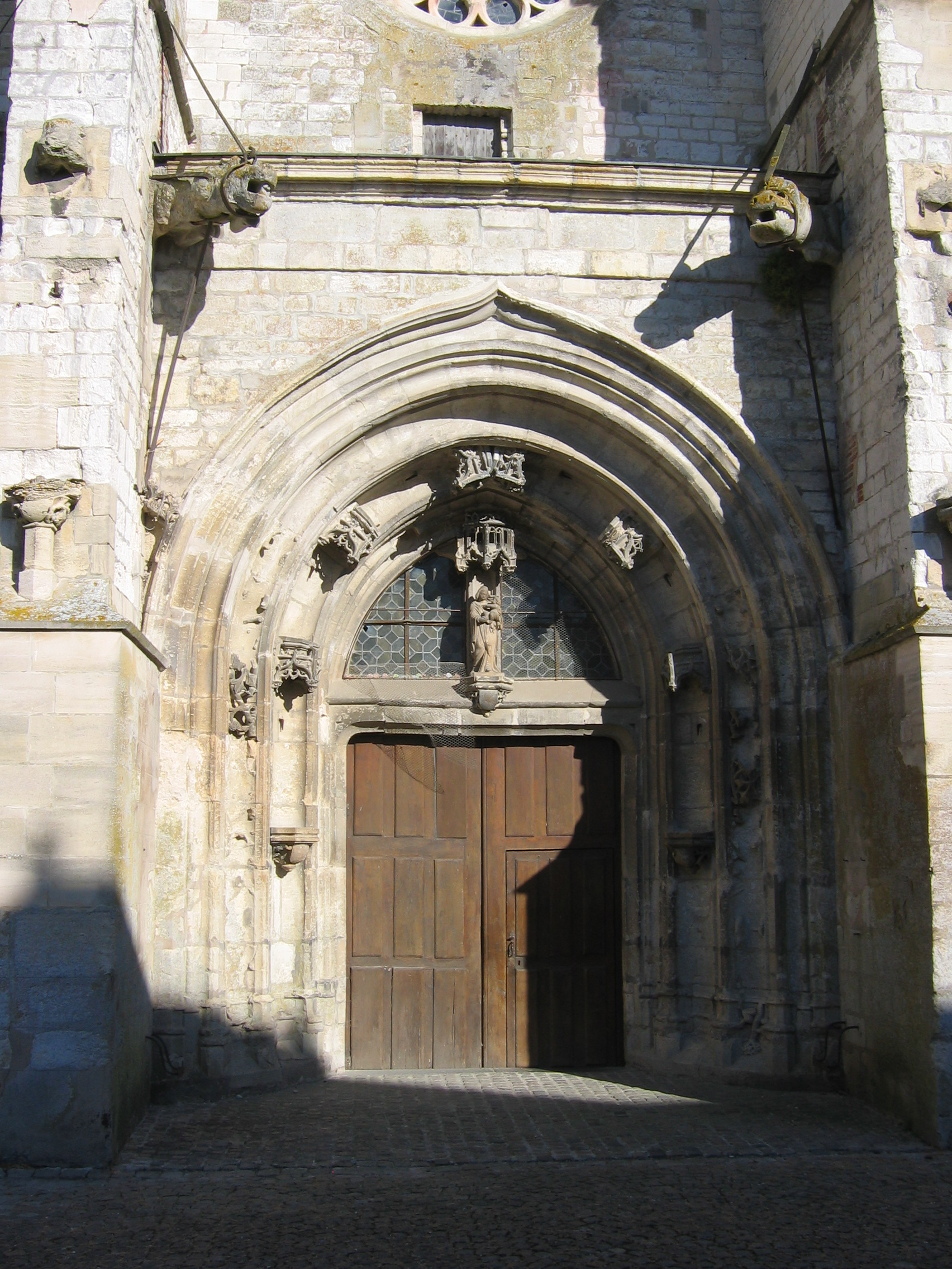 Château-Porcien Ardennes France Eglise